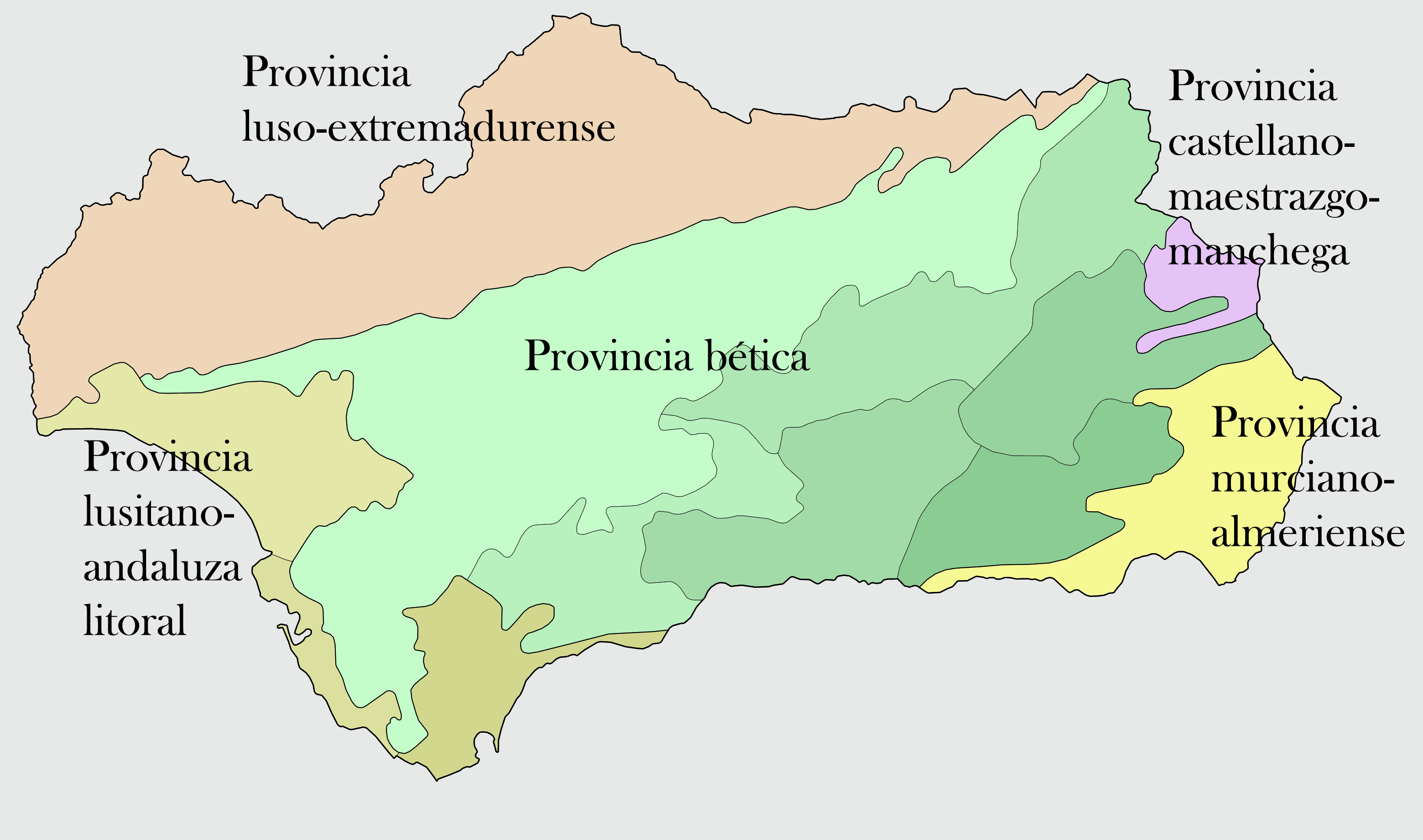 Mapa de Andalucía donde se muestran las provincias corológicas de la comunidad.